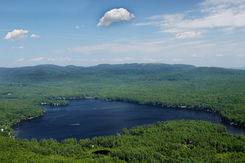 Crystal Lake, Gilmanton,NH